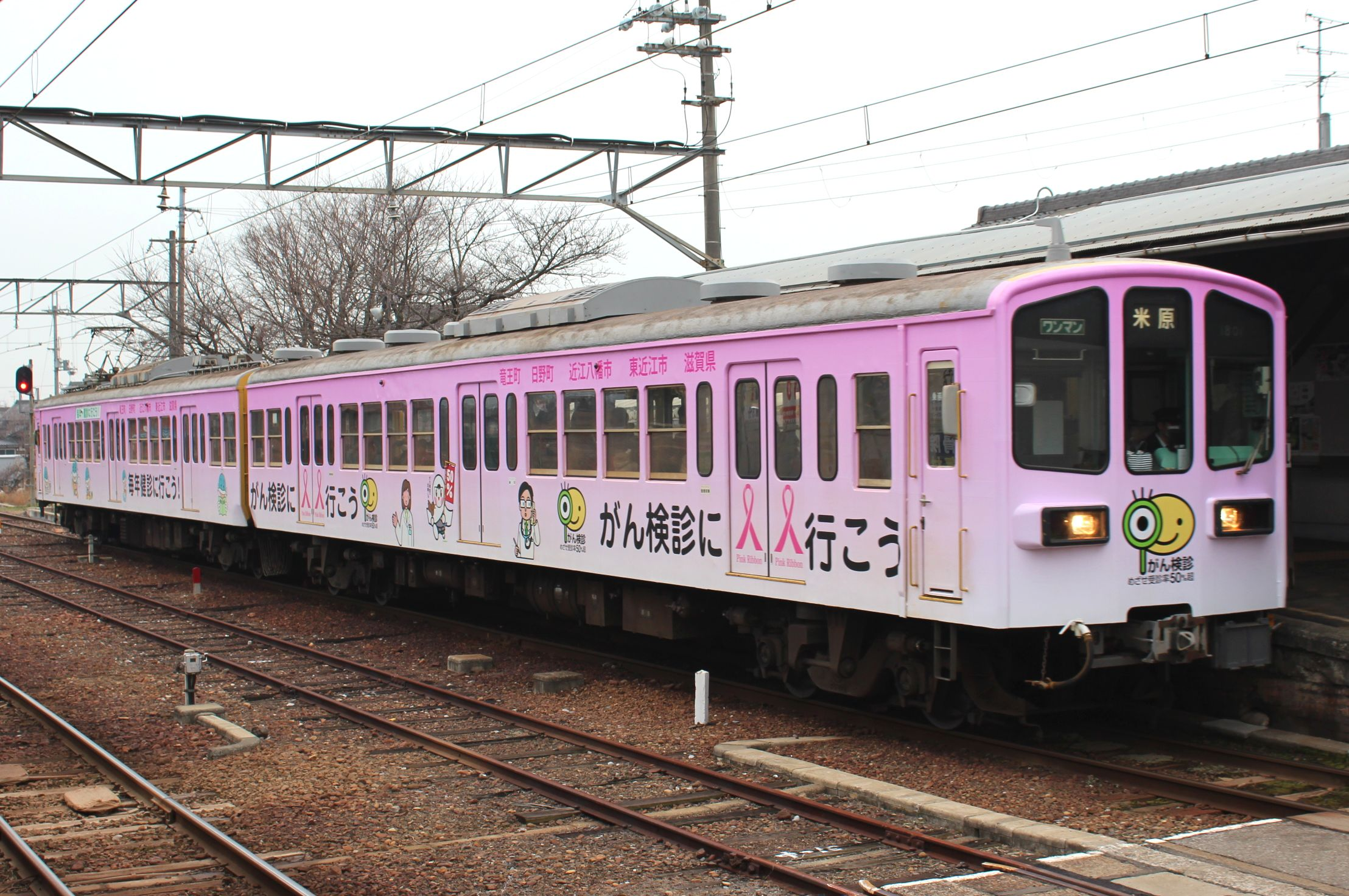 近江鉄道800系電車801F がん検診啓発広告編成